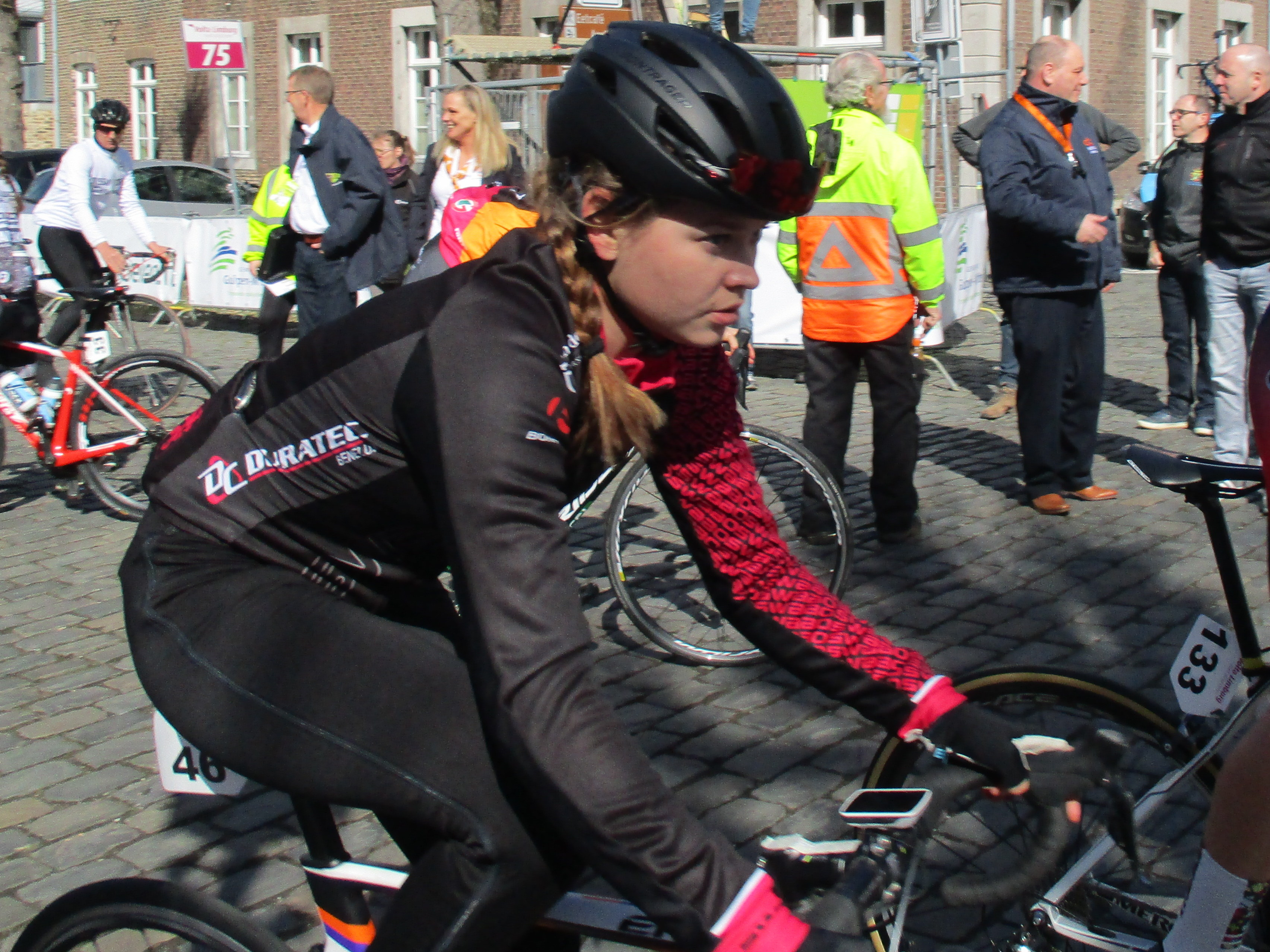 Start van de Volta Limburg Classic voor vrouwen 2018 in de Diepstraat in Eijsden